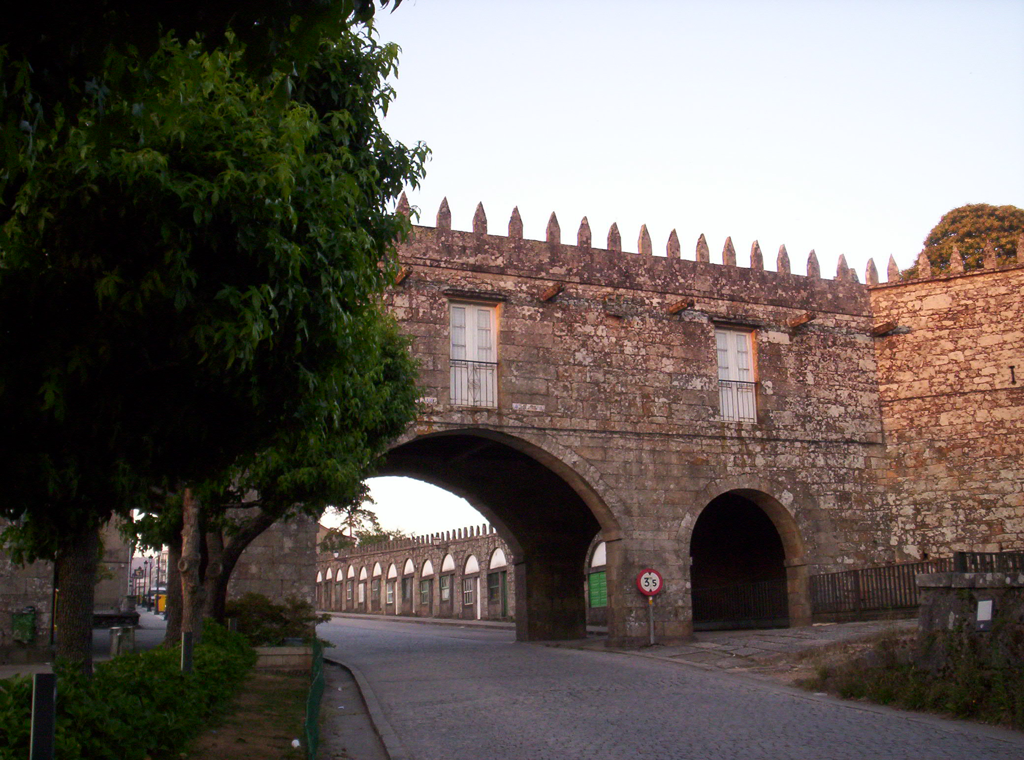 Pazo de Cotón, Negreira, Galiza